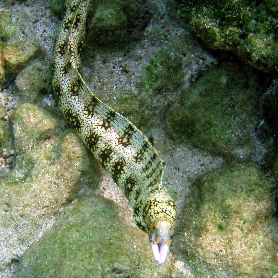 Snowflake moray, Echidna nebulosa in Kona, Big Island of Hawaii